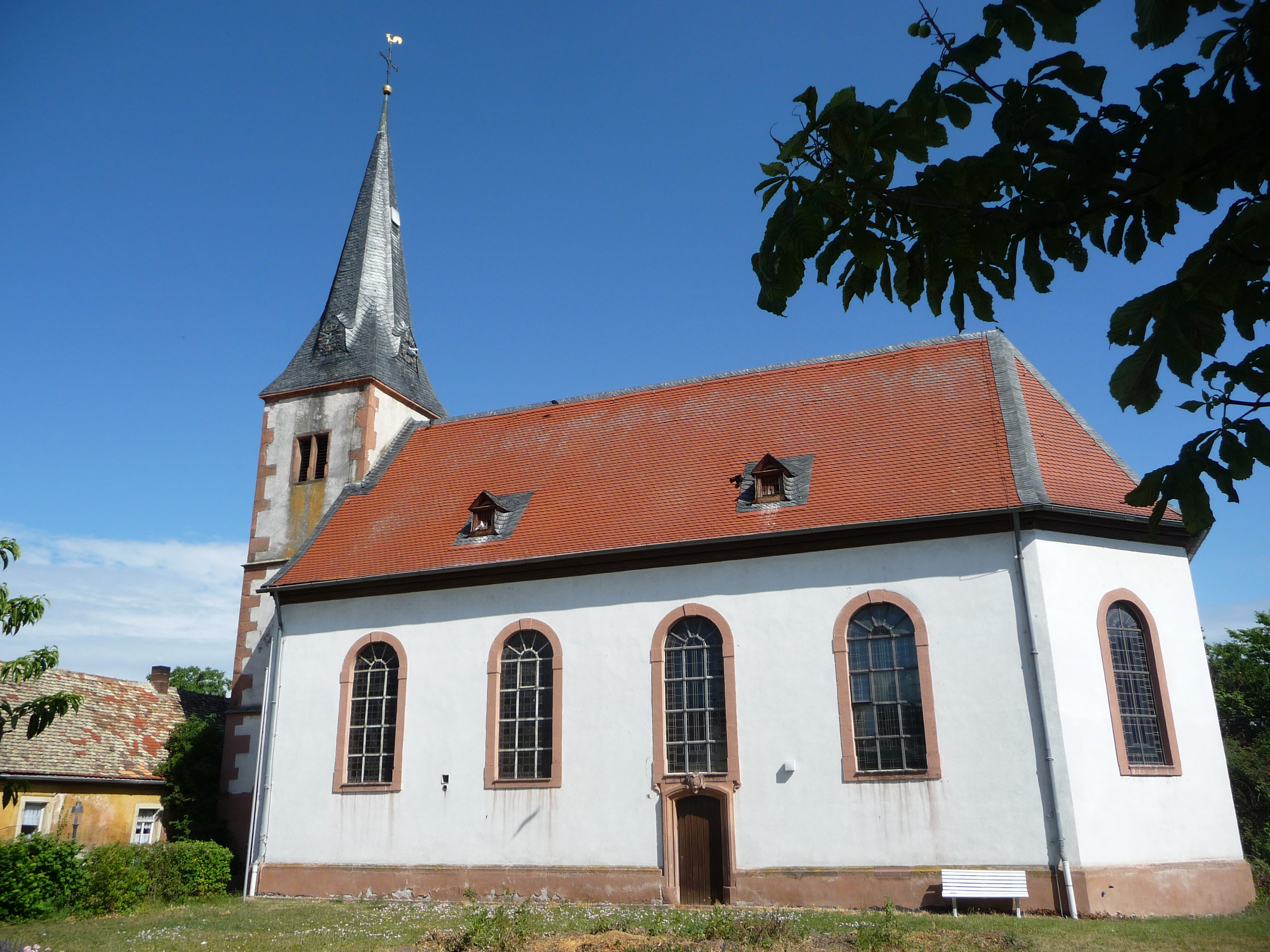 Mörstadt ist eine Ortsgemeinde im Landkreis Alzey-Worms in Rheinland-Pfalz.